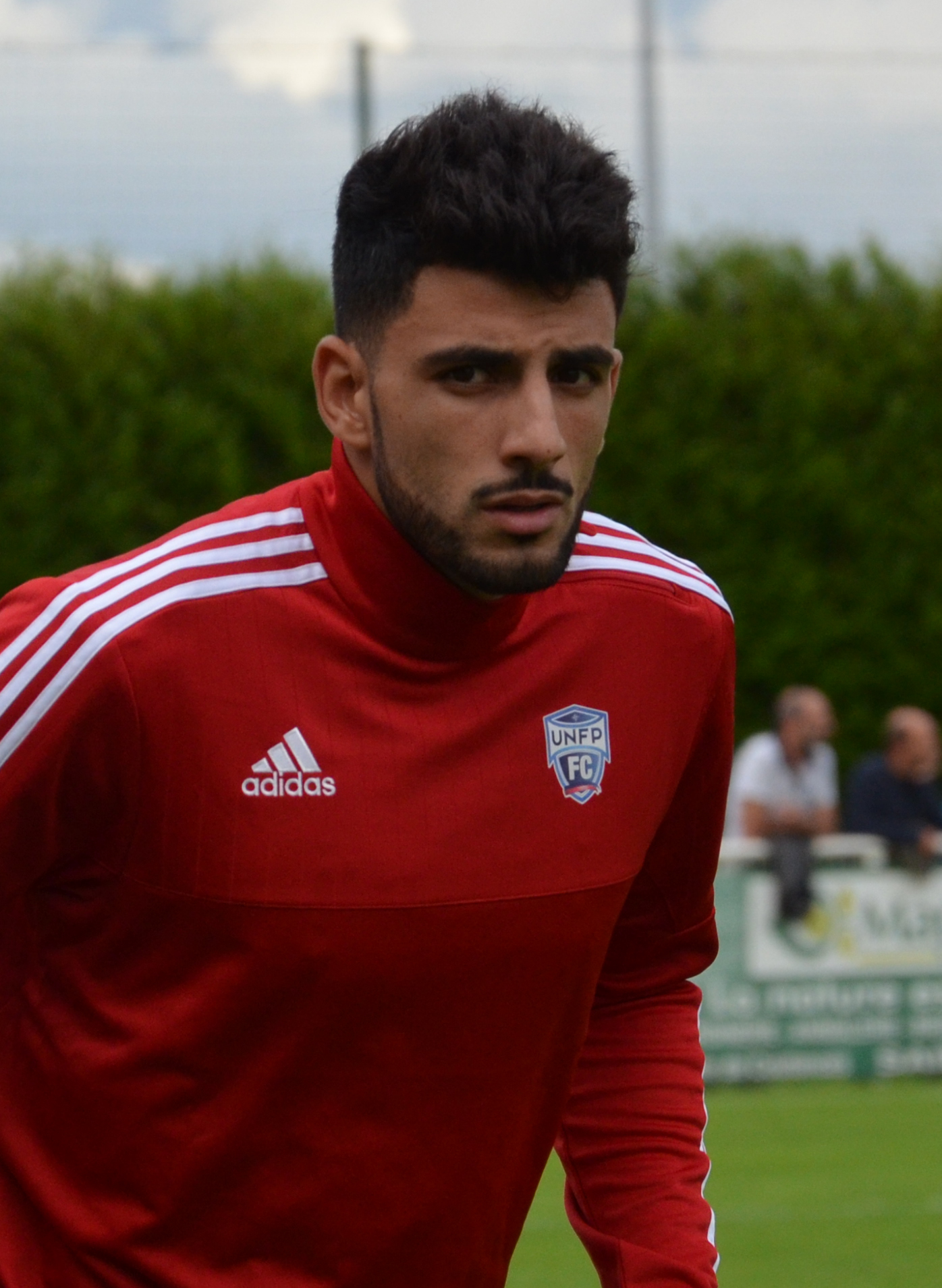 Photographie prise lors du match opposant le SM Caen à l'UNFP en match amical au stade Louis-Villemer de Saint-Lô le 30 juillet 2016. Ici, Jonathan Rivas.